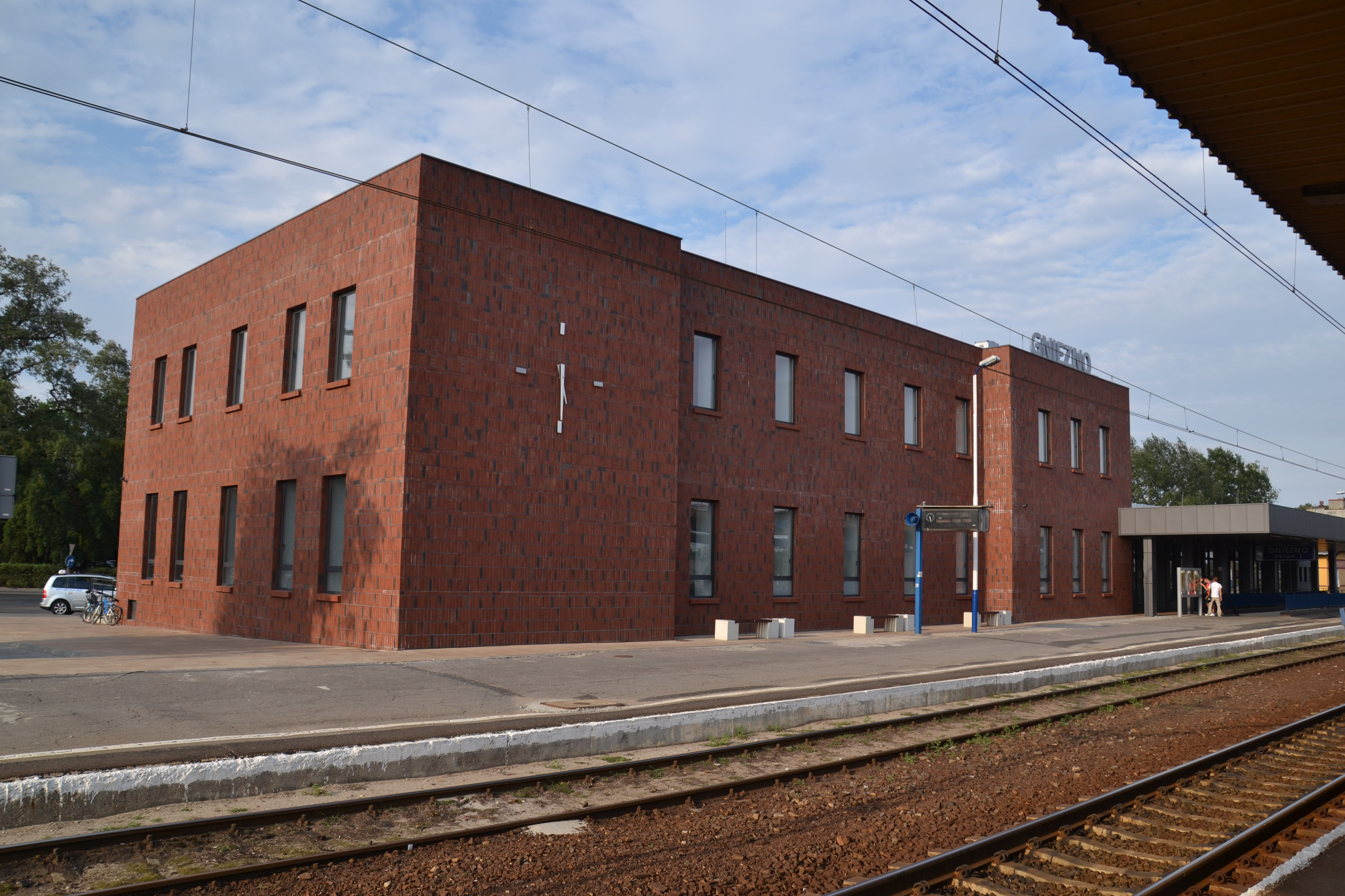 Widok dworca kolejowego w Gnieźnie od strony peronów This photo was taken during Railway Wikiexpedition 2015 set up by Wikimedia Polska Association in cooperation with Fundacja Grupy PKP. You can see all photographs in category Wikiekspedycja kolejowa 2015.